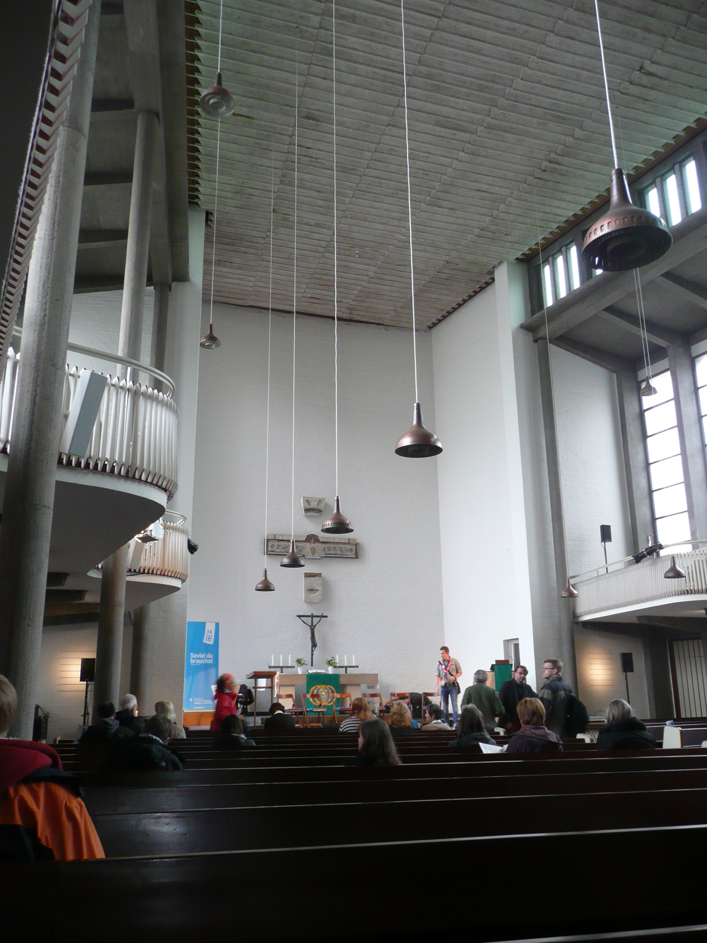 Hamburg-St. Georg, Hl. Dreieinigkeitskirche, Inneres, Blick auf den Altar mit dem Kruzifix von Jürgen Weber und darüber die Darstellung der göttlichen Dreieinigkeit von Karl Knappe